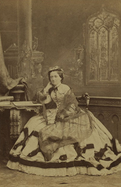 Louise, Queen of Denmark (1817-1898)